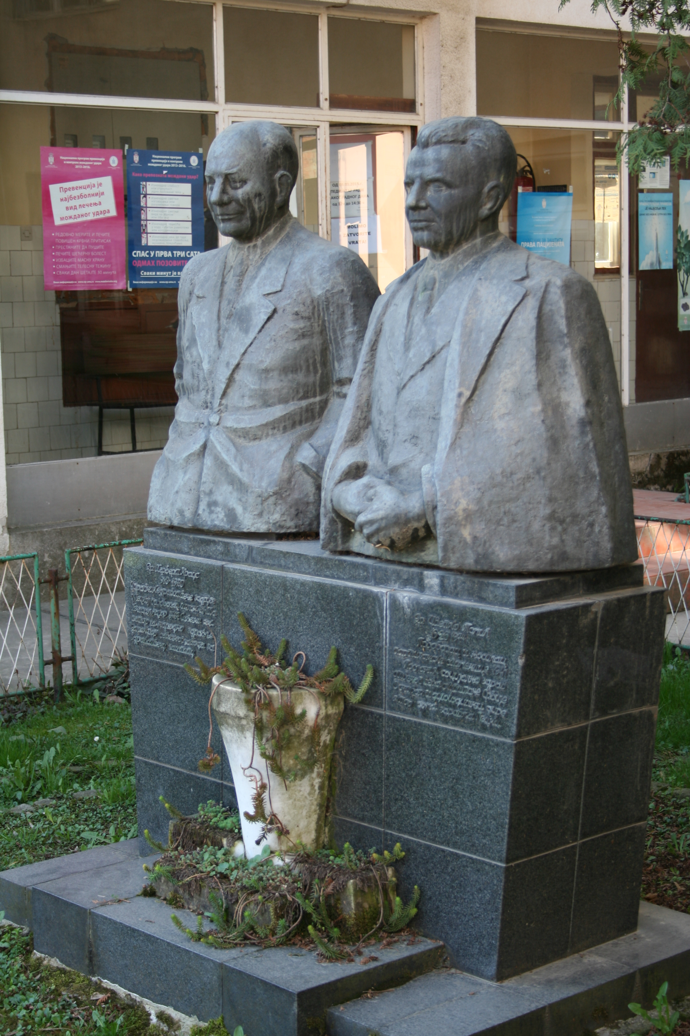 Pecka, Osečina